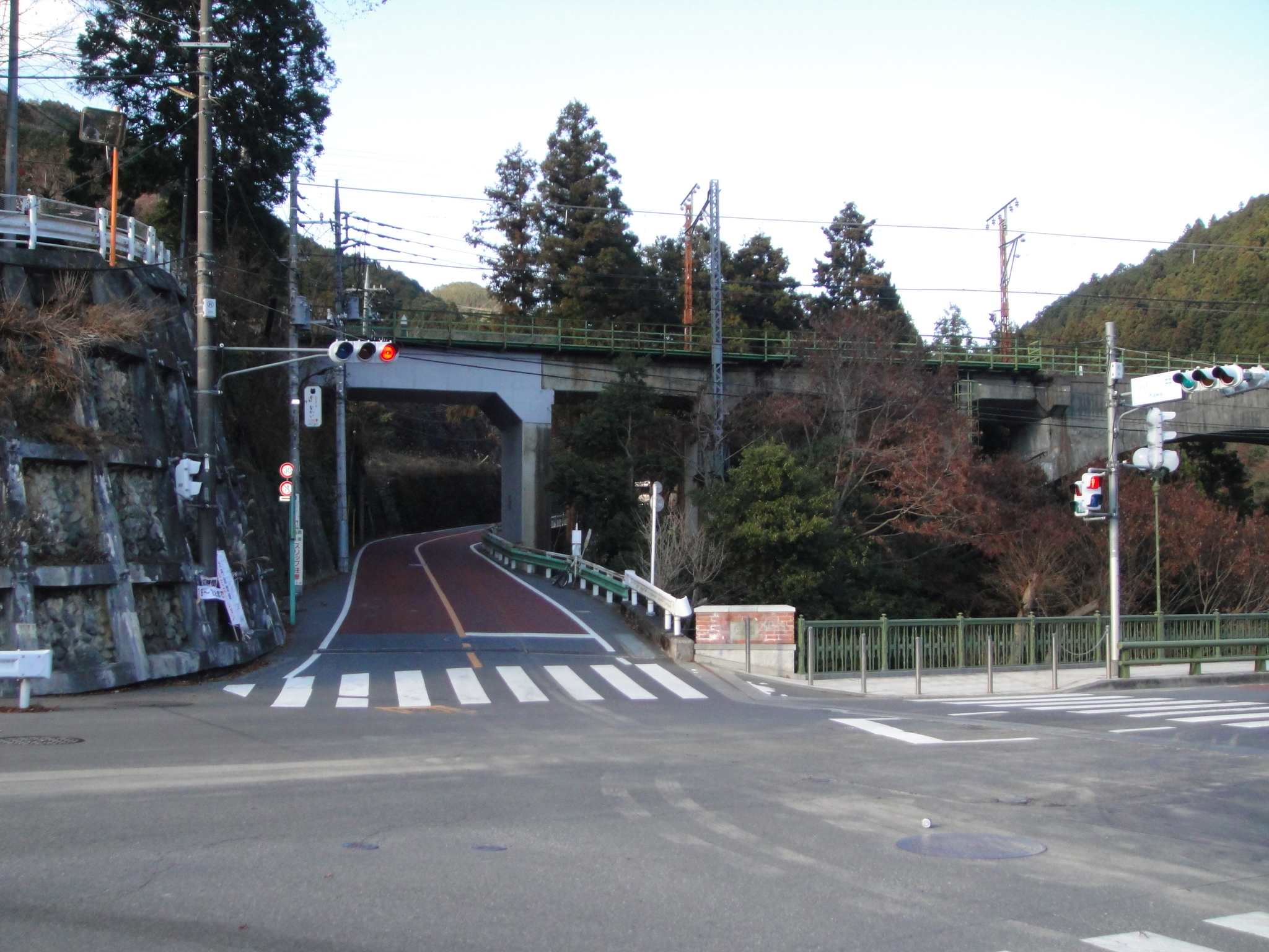 東京都道202号上成木川井線の終点（国道411号）交点。